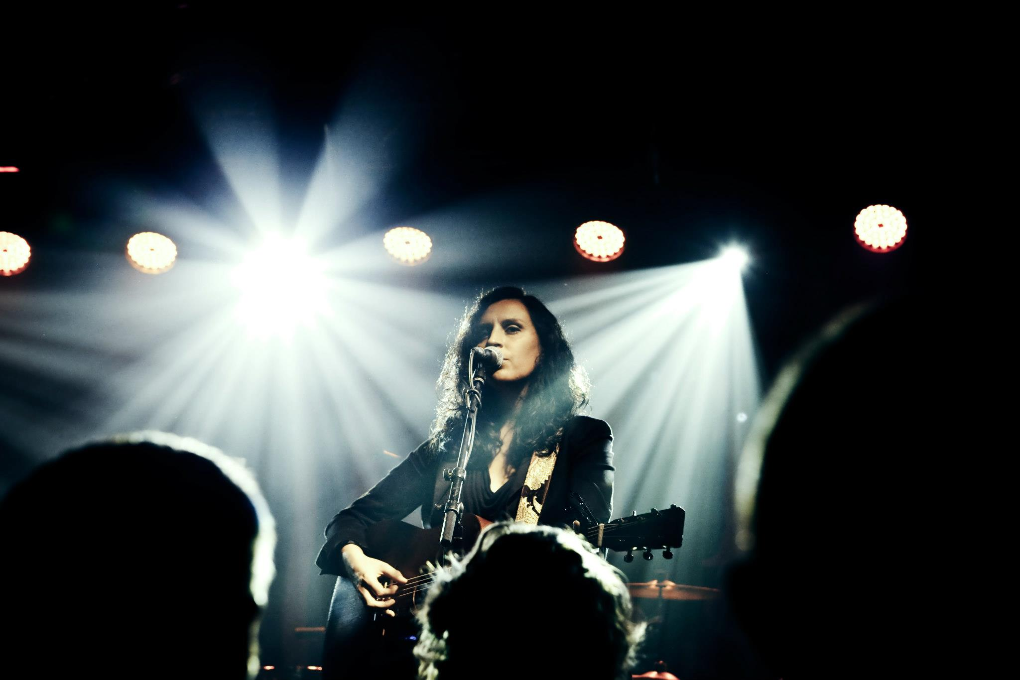 Colline Hill en 1ère partie de The Levellers